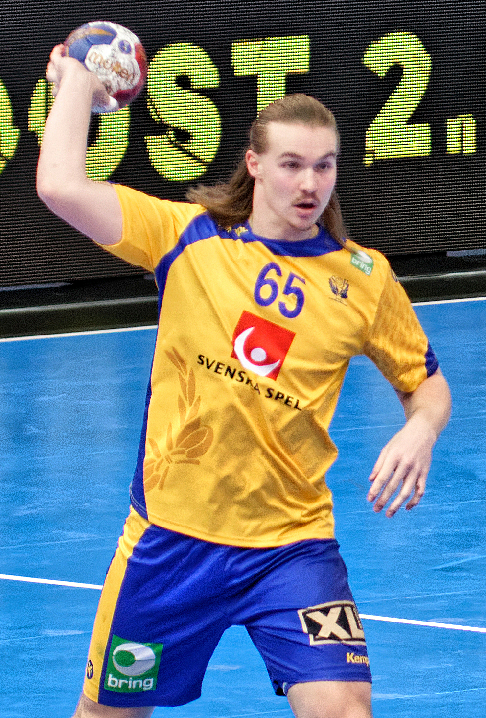 Match de la phase préliminaire du championnat du monde masculin de handball 2017 entre la Suède et le Qatar (Groupe D). A Bercy, le 18 janvier 2017.